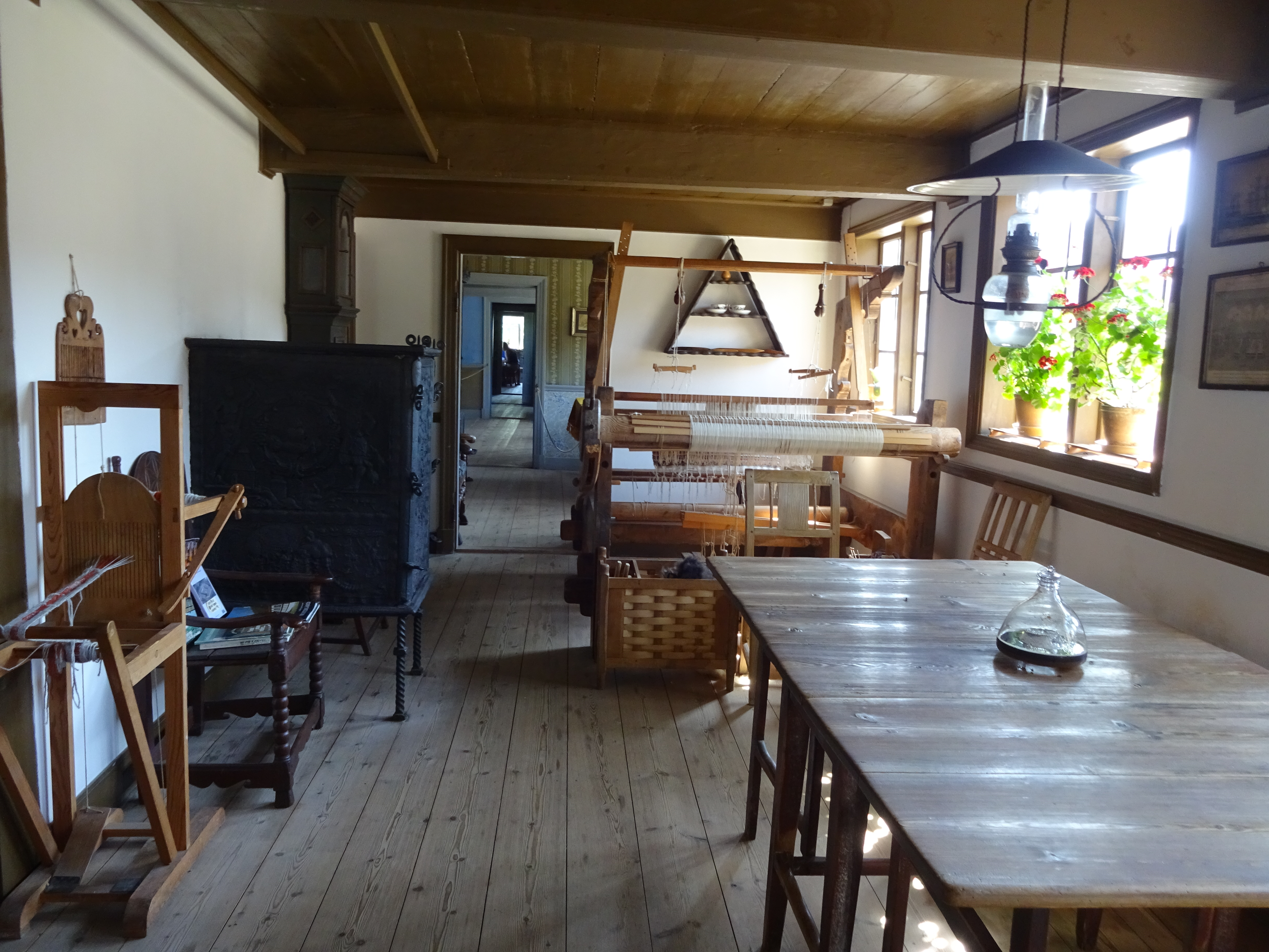 Herrenhaus innen